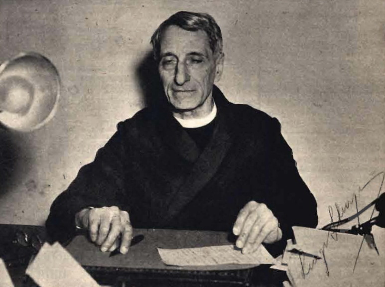 Italian politician Luigi Sturzo